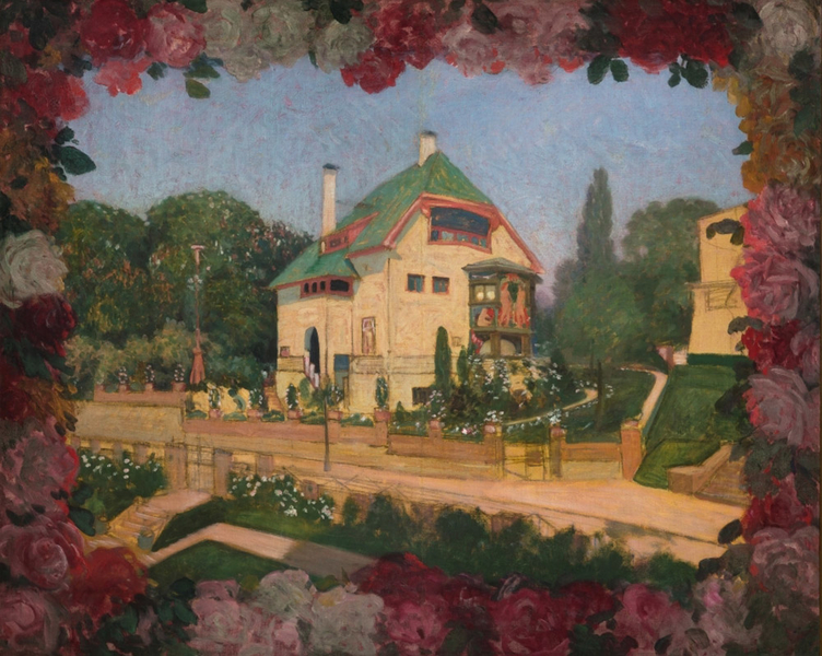 Hans Christiansen: Haus in Rosen, 1901, Hessisches Landesmuseum Darmstadt, Foto: Gregor Schuster